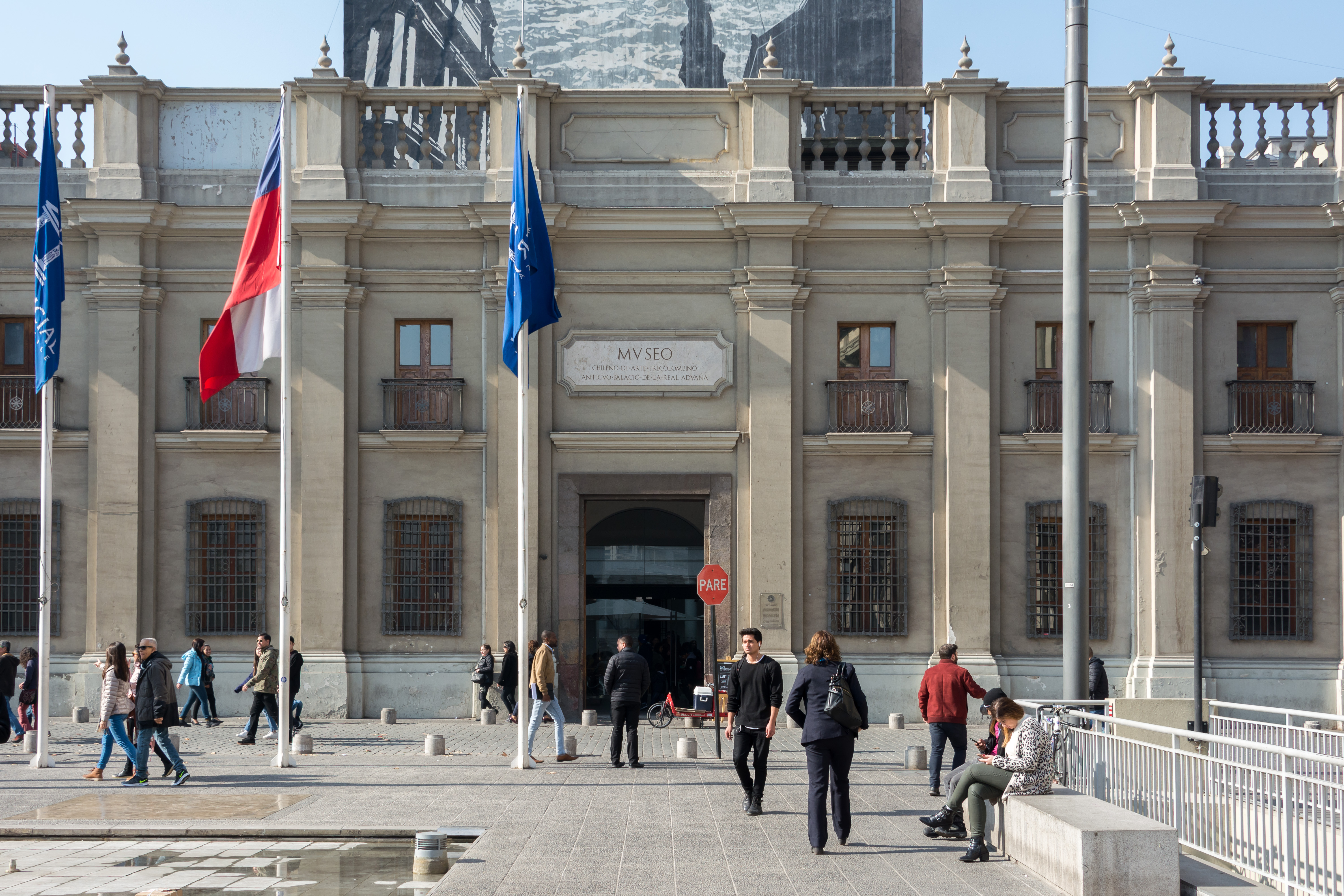 Museo Chileno de Arte Precolombino, Santiago, Región Metropolitana de Santiago, Chile